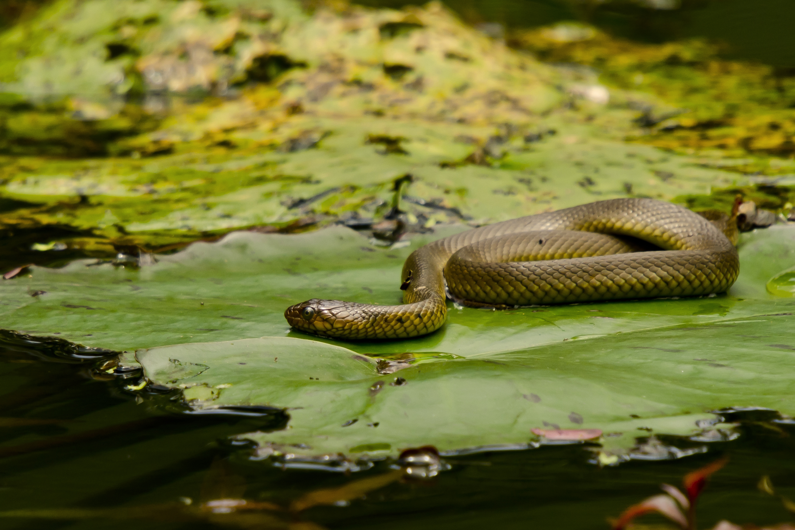 Rainbow Water Snake (Enhydris enhydris)